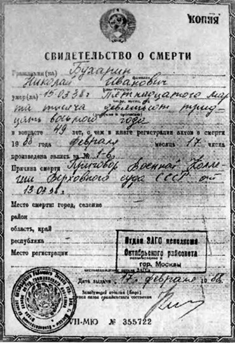 Копия свидетельства о смерти Николая Ивановича Бухарина, расстрелянного 15.03.1938 по приговору Военной коллегии Верховного суда СССР от 13.03.1938. Свидетельство выдано 17.02.1988 Отделом ЗАГС Исполкома Октябрьского райсовета г. Москвы.